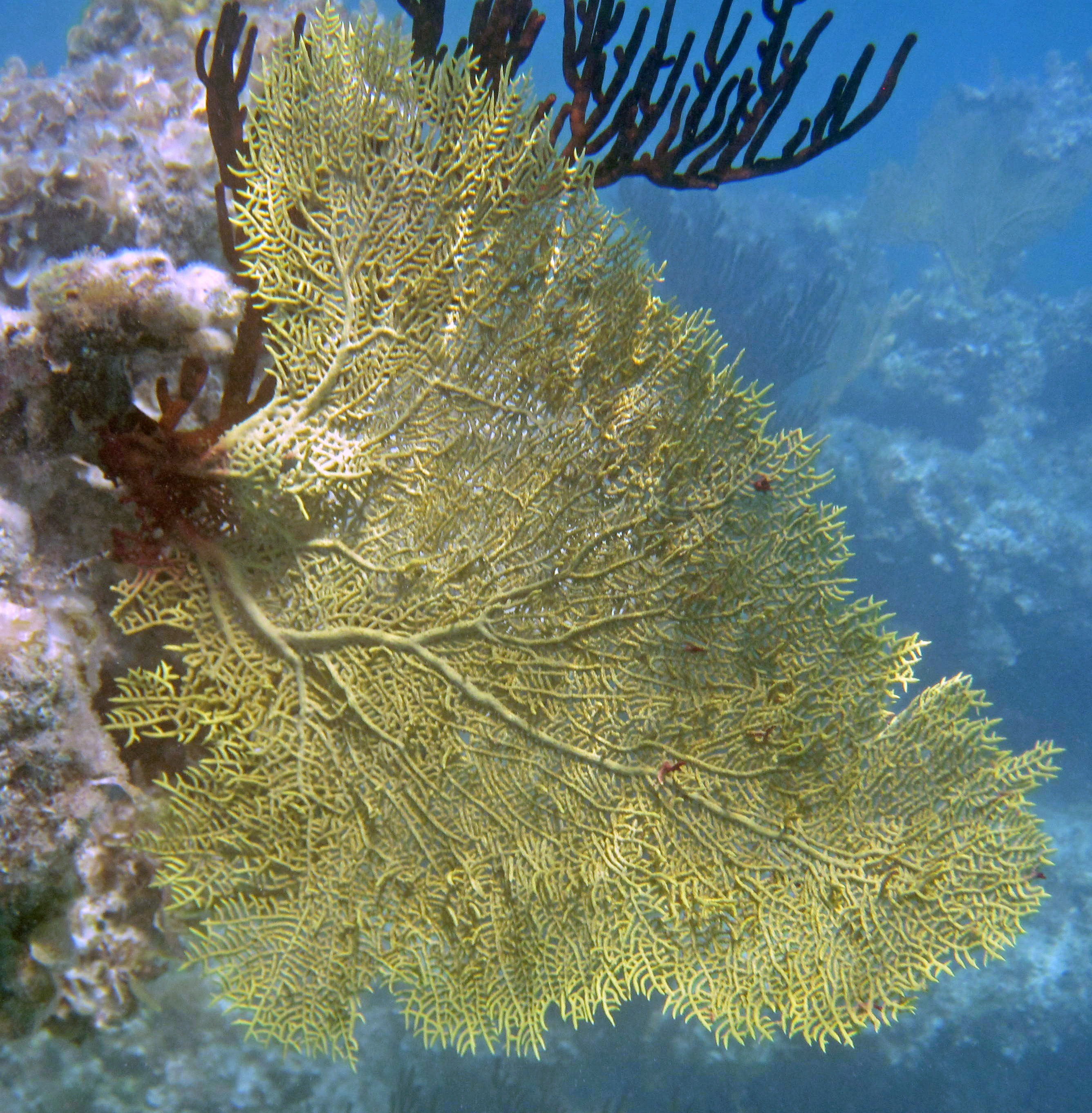 Gorgonia flabellum, sur de Long Bay, isla San Salvador, Bahamas